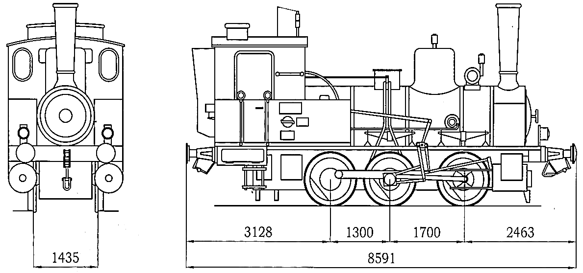 Parný rušeň vystavený v trvalej expozícii na železničnej stanici v Trnave